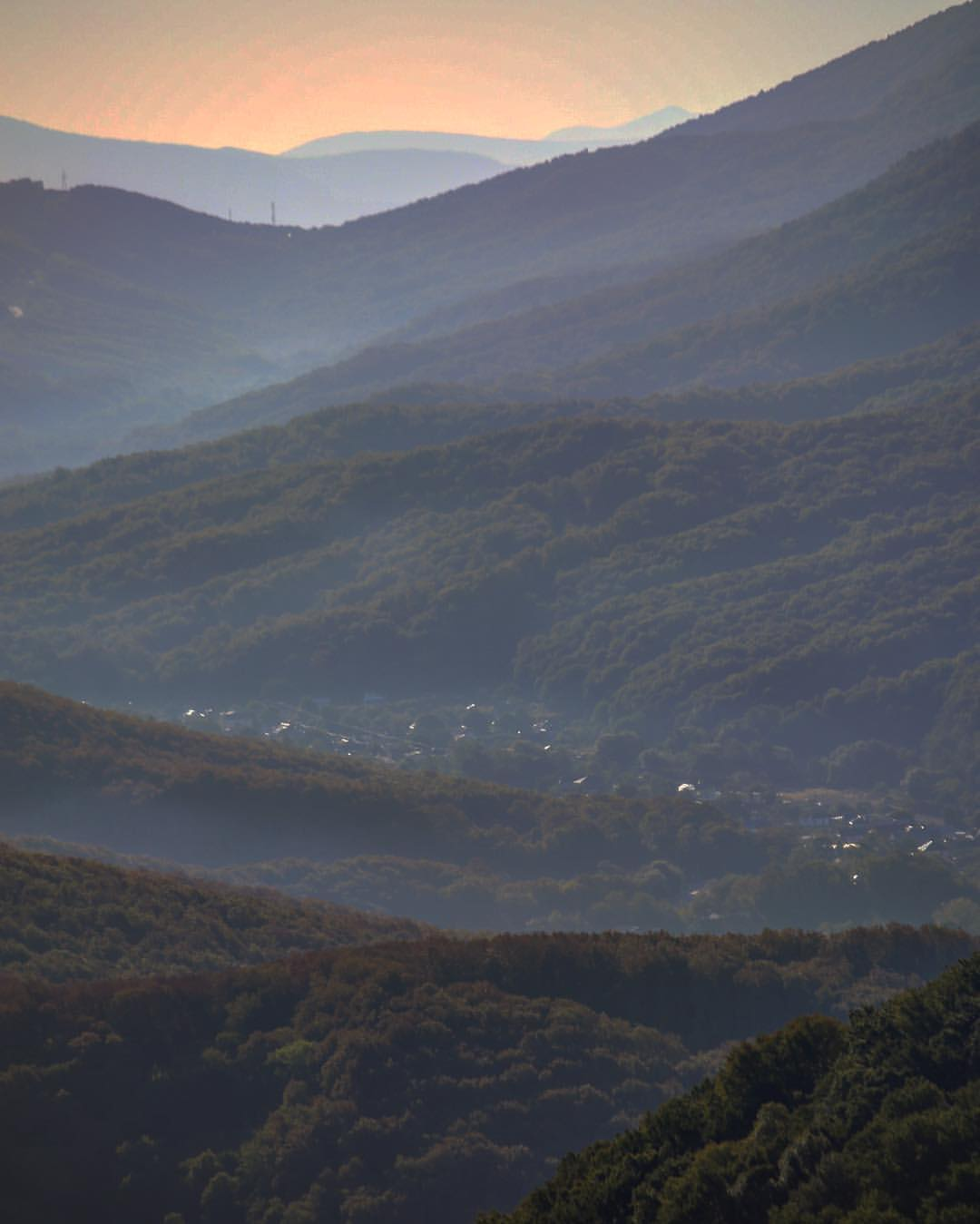 Вид на Широкую Щель